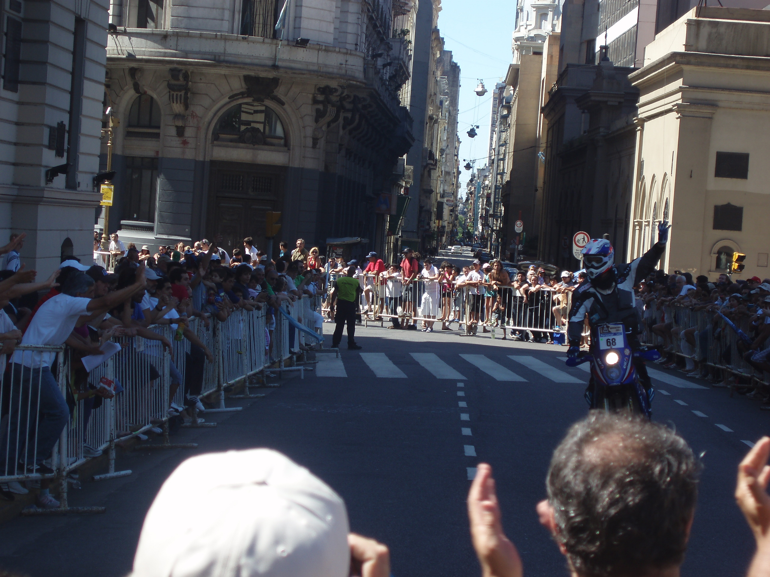 Arranca el Rallye Dakar del 2011, Plaza de Mayo (frente al Palacio de la Ciudad), Buenos Aires